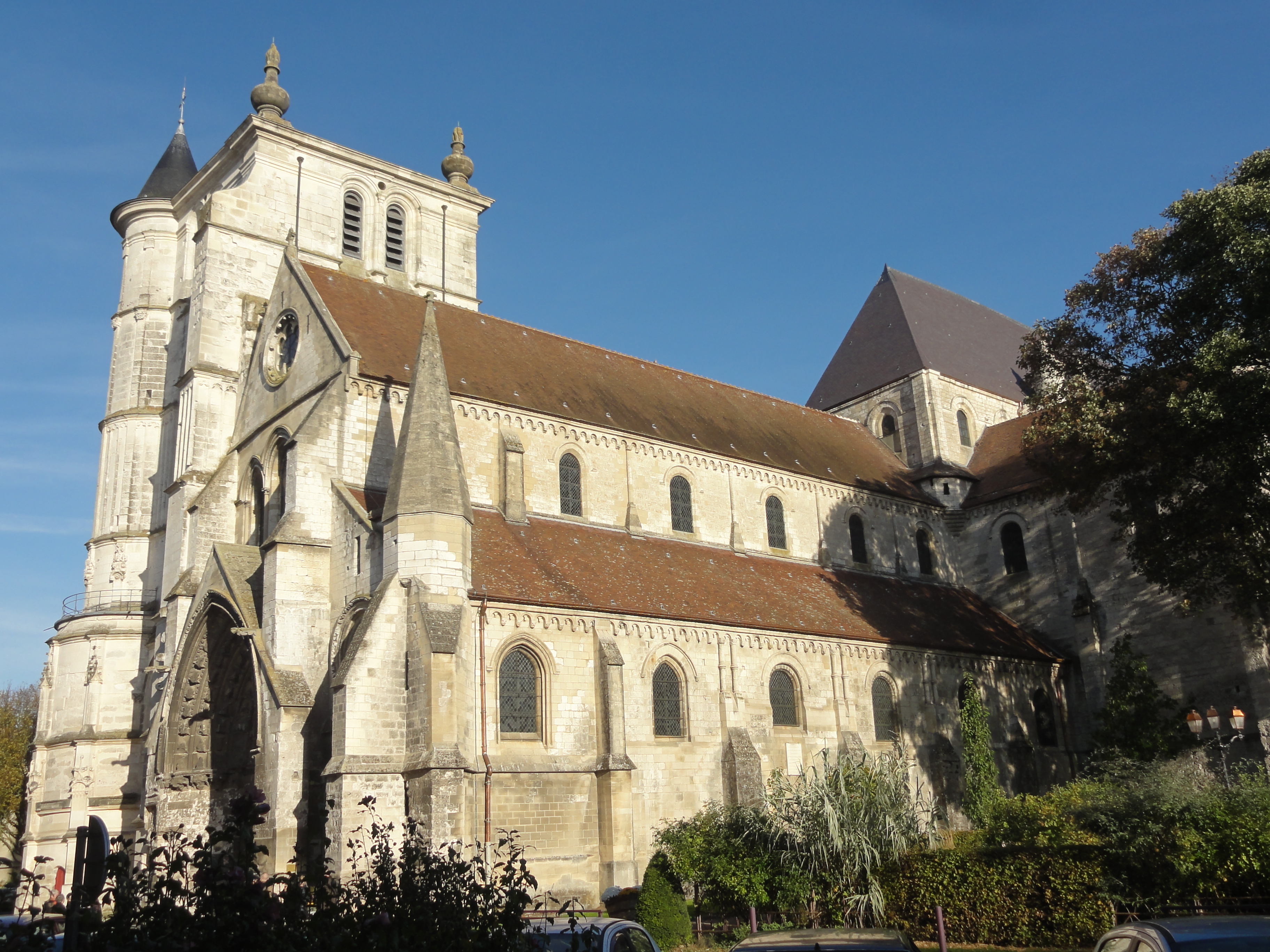 Vue partielle depuis le sud.